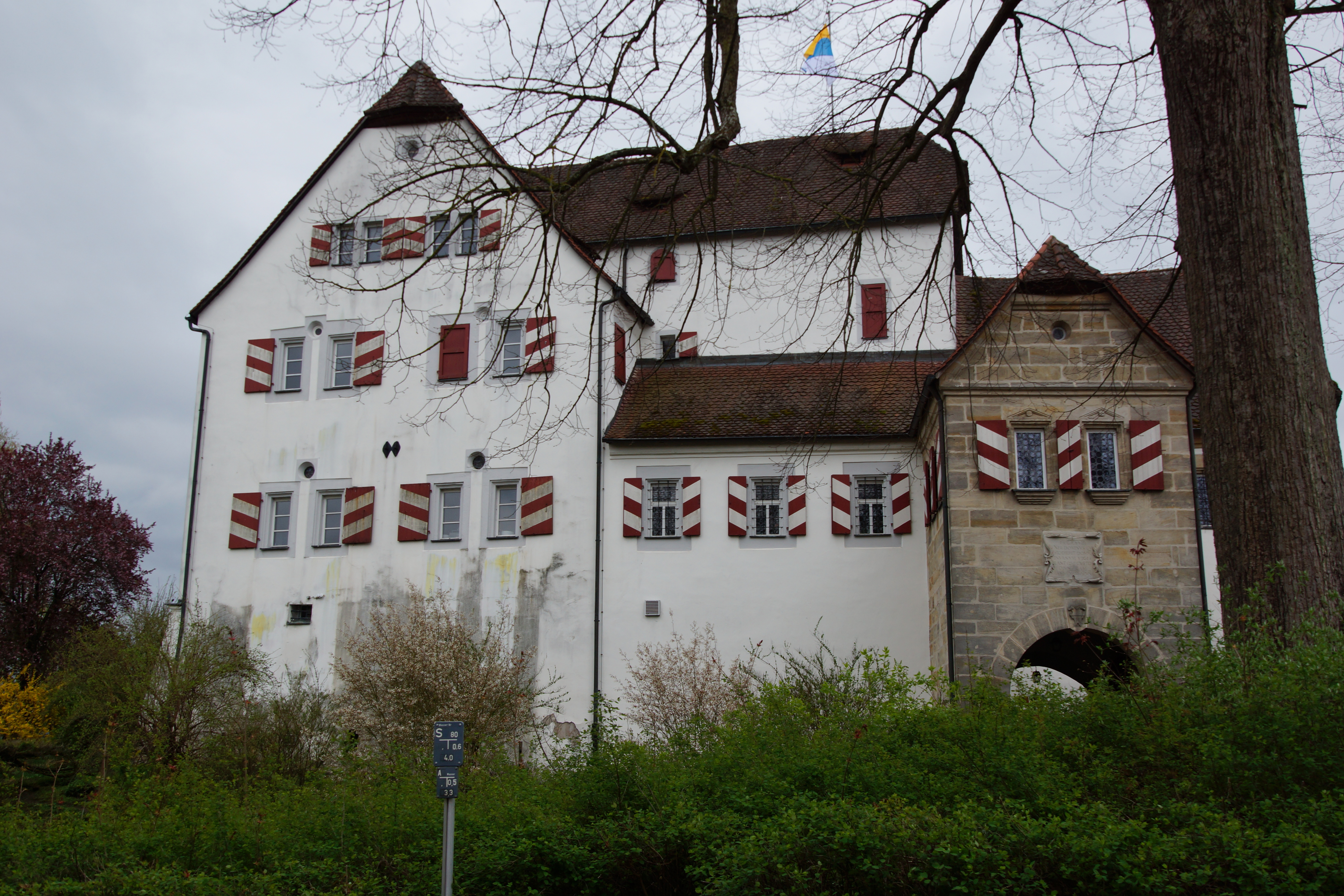 Das sogenannte Pfinzingschloss in Henfenfeld